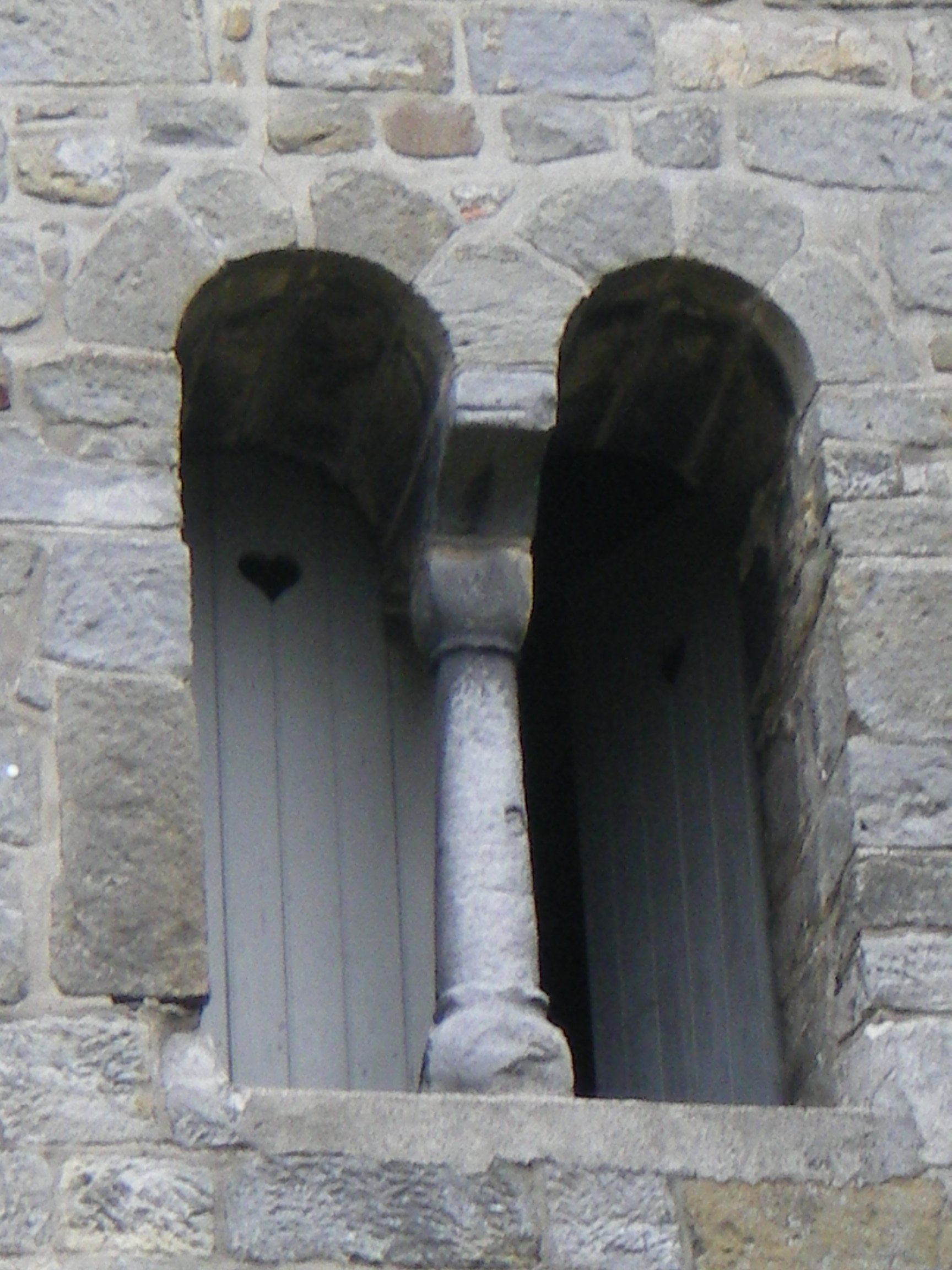 Fensteröffnung an der Westseite des Kirchturms mit Herzchenausschnitt im Fensterladen